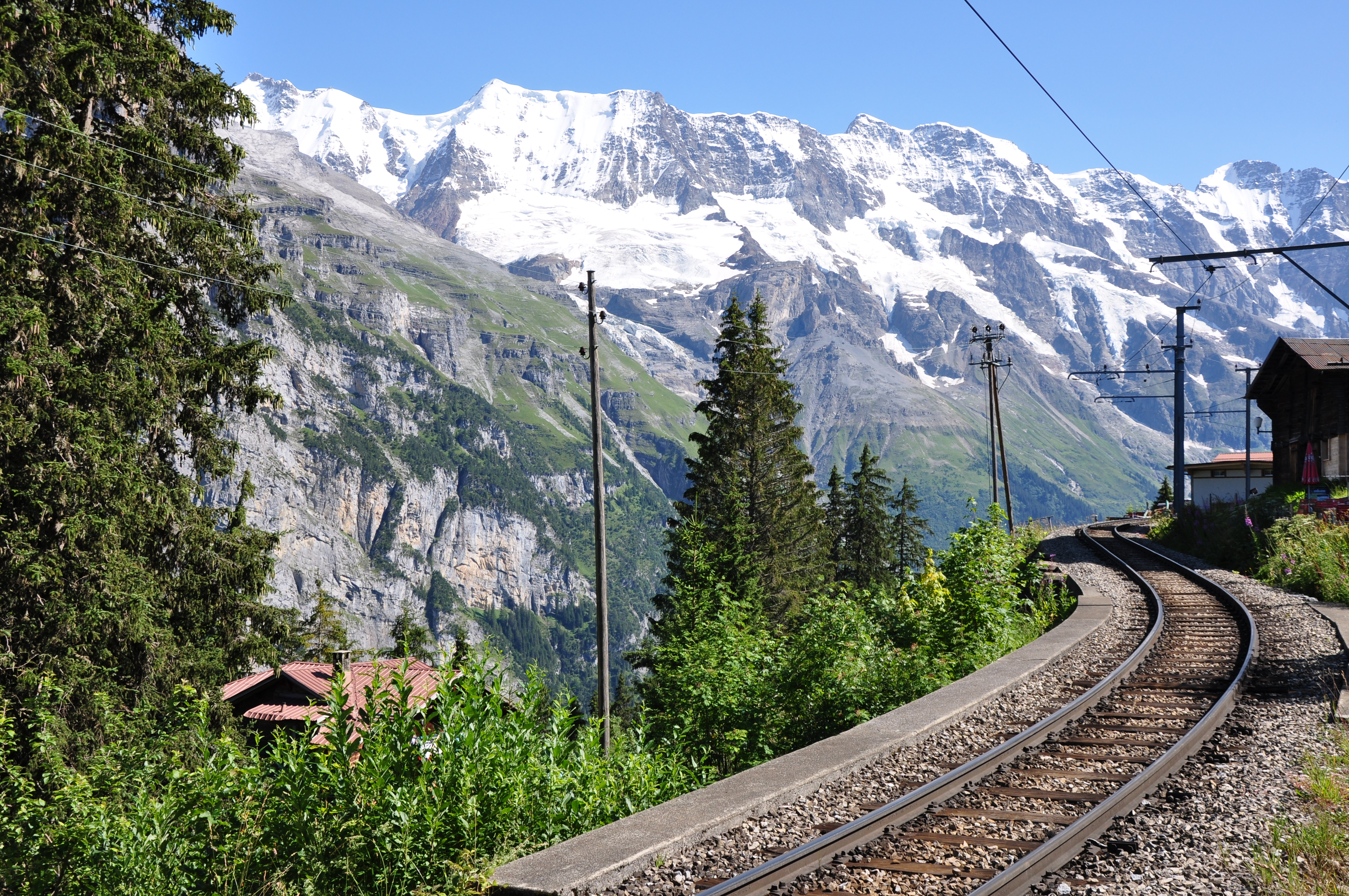 Switzerland, Canton of Bern, Mürrenbahn with Ebnefluh and Mittaghorn